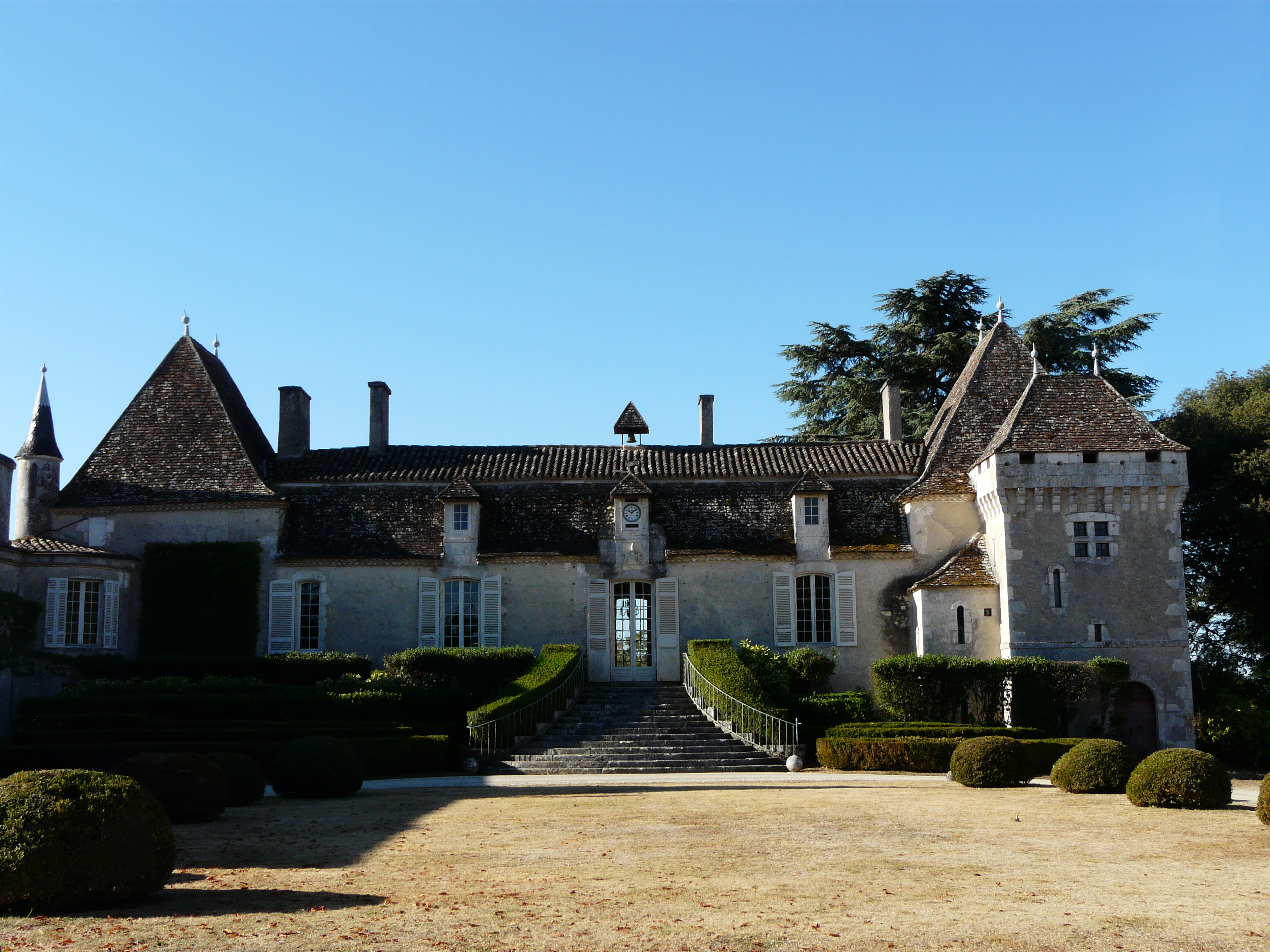 La façade nord du château de Pouthet, Eymet, Dordogne, France.